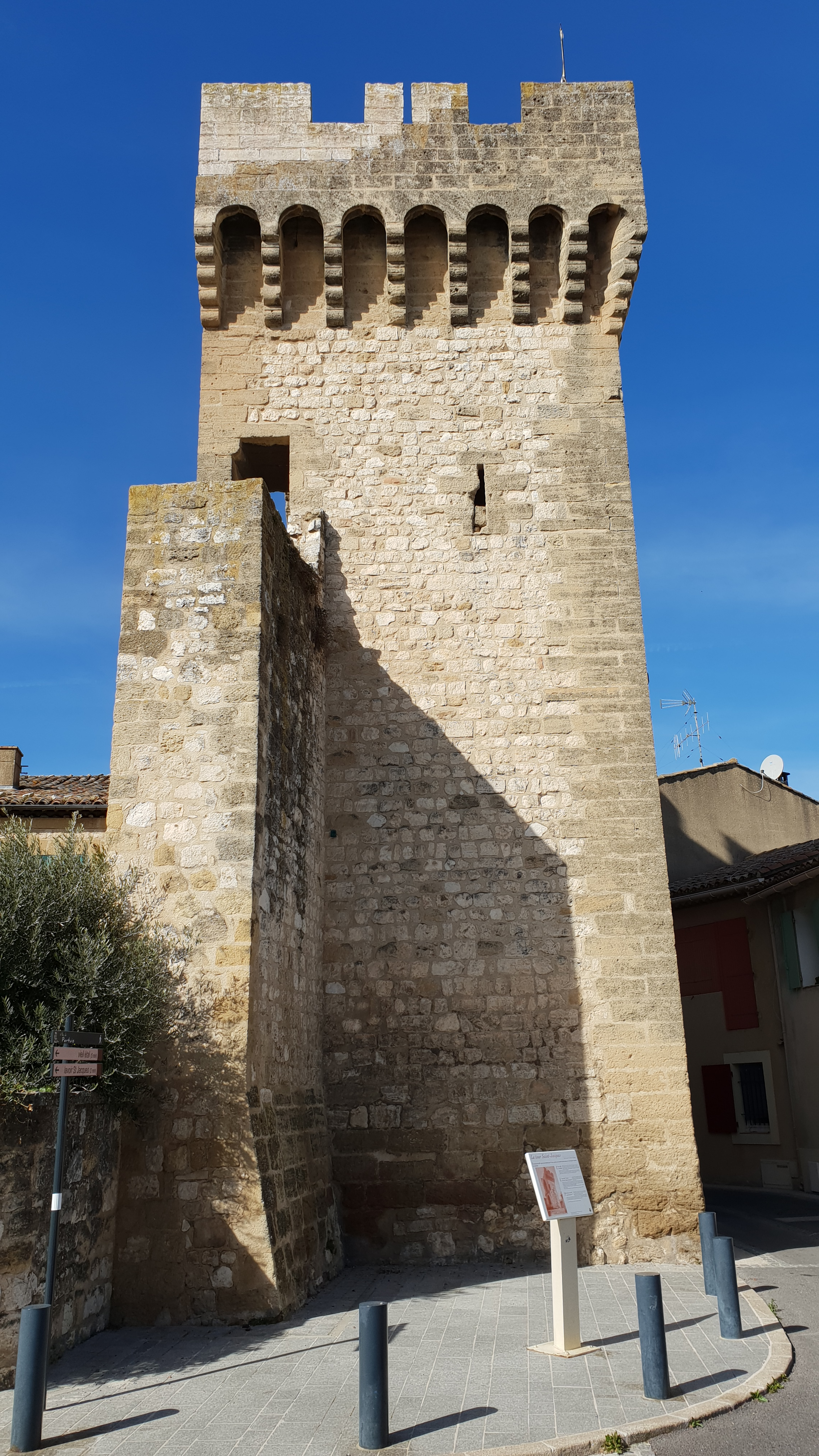 Tour Saint-Jacques, Pertuis (Vaucluse, France)